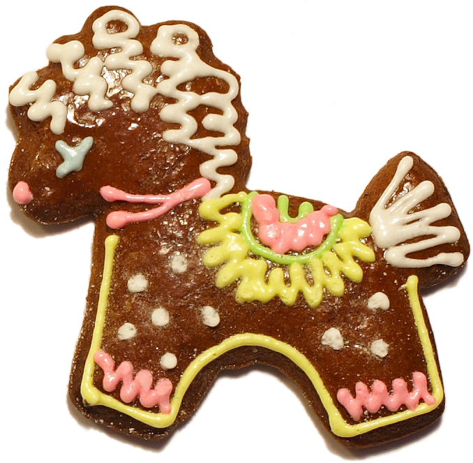 Козули, вид архангельских пряников